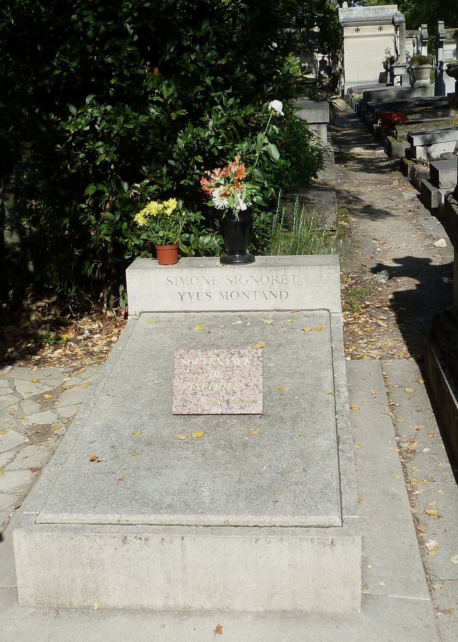 Pierre tombale de Simone Signoret aux côtés de Yves Montand - Père-Lachaise Cemetery - Division 44 à Paris